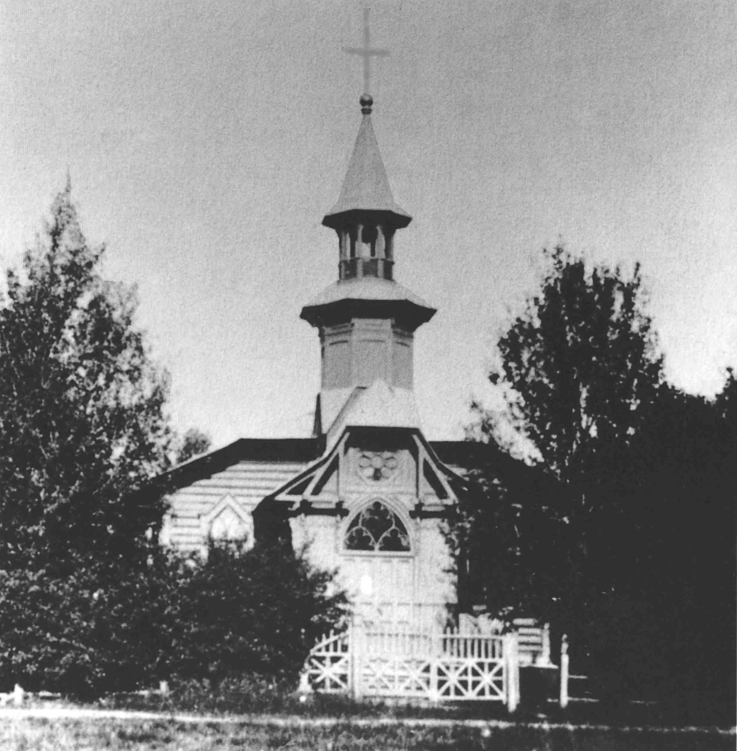 Кирха святой Марии в Лахте.